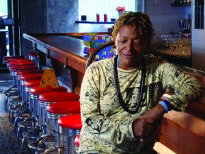 Cantora brasileira Mart'nália em imagem do acervo da TV Brasil.